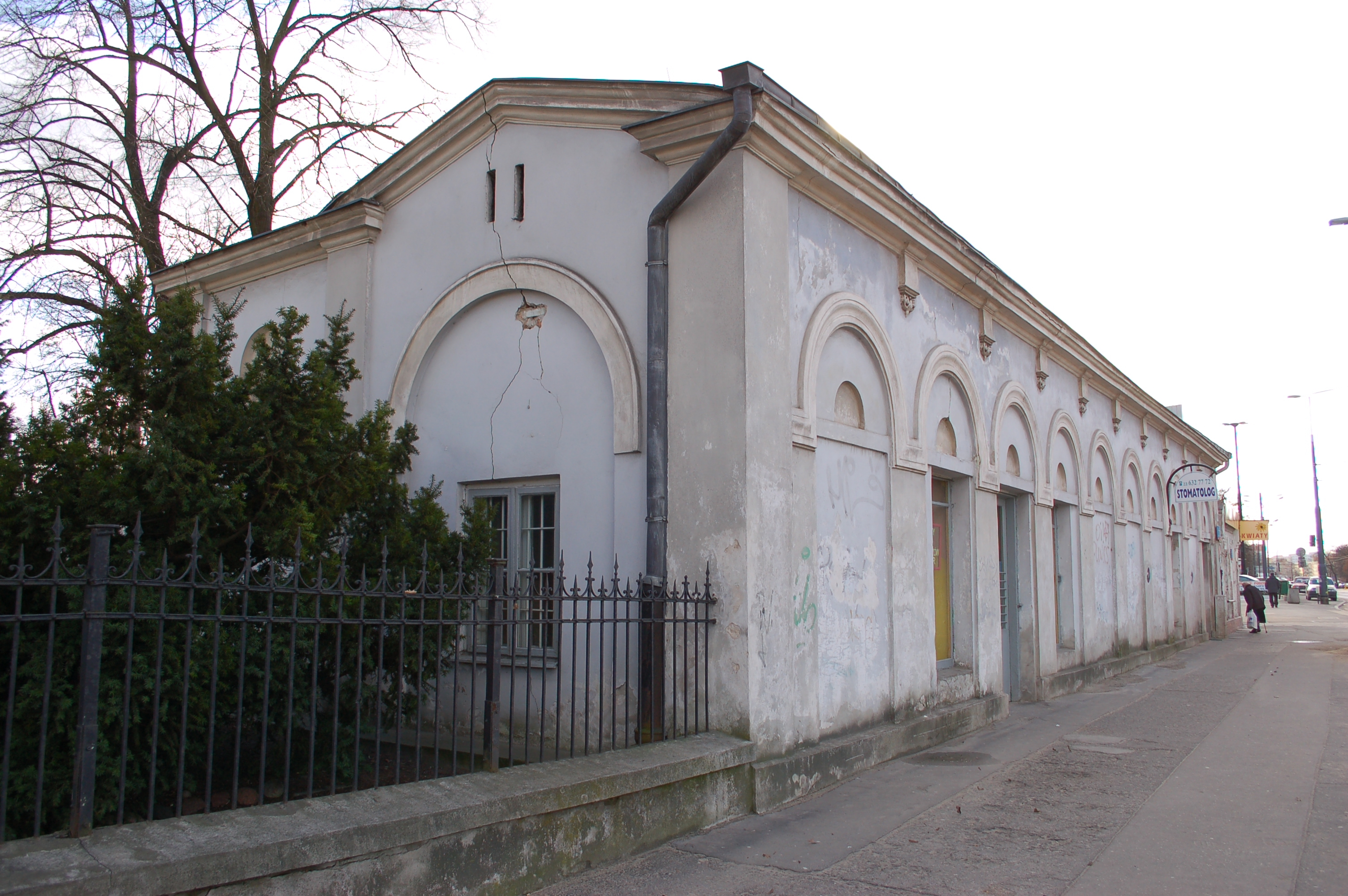 Biernacki Palast Warschau